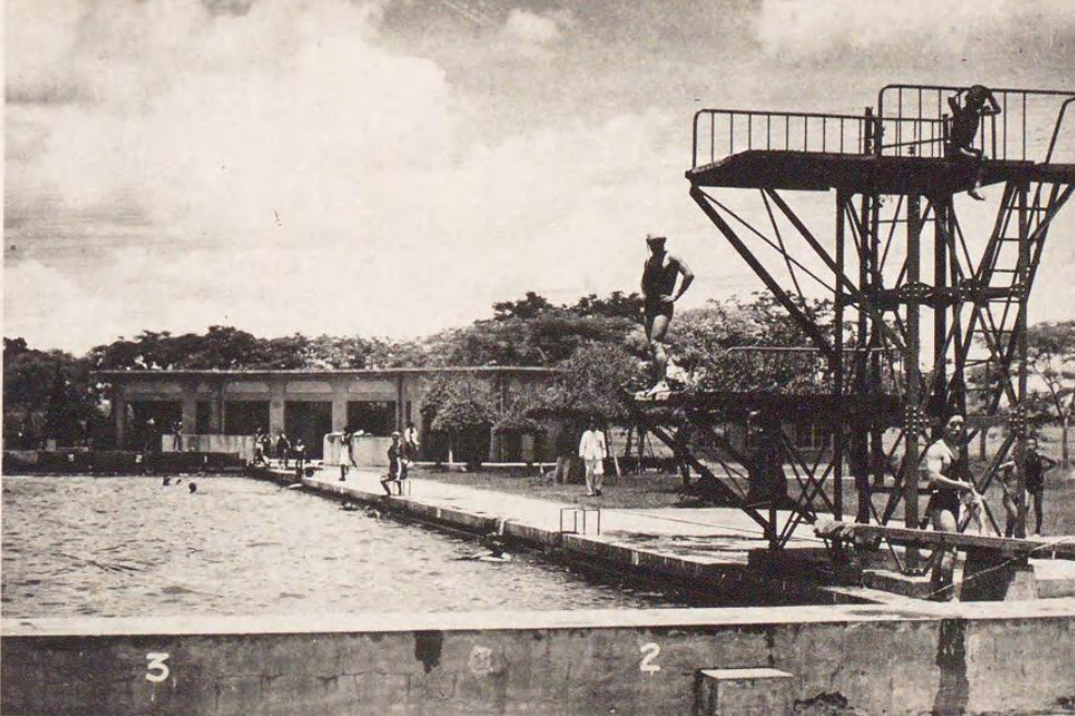 原址現為臺體大游泳池